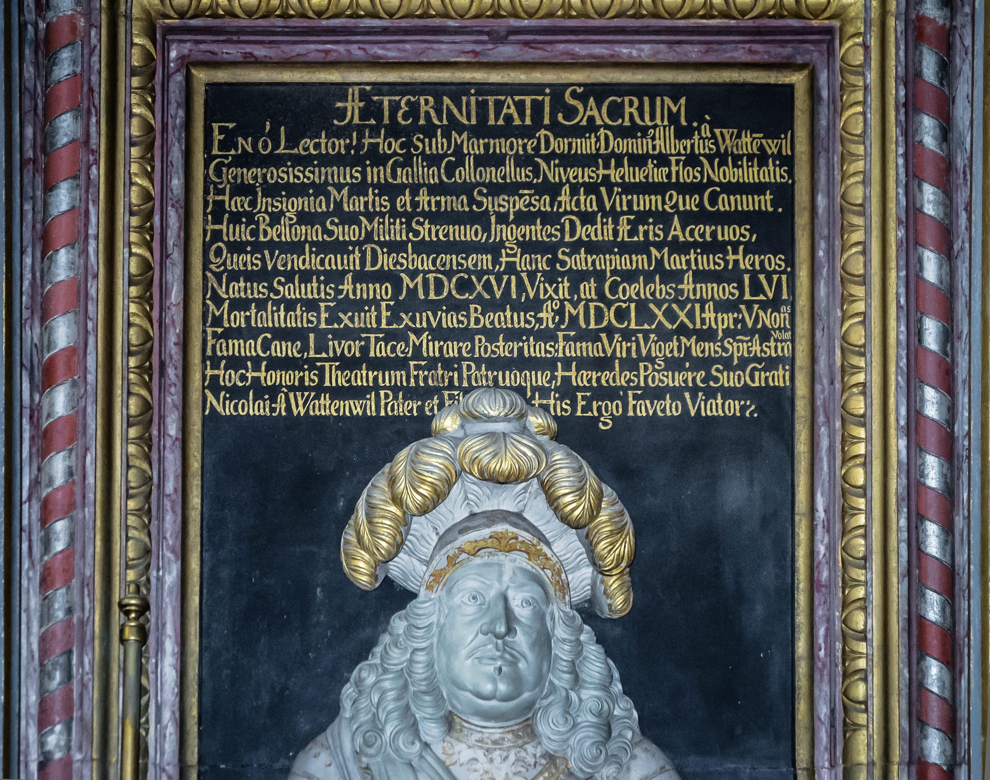 Südseitig anschliessend an den spätgotischen Chor der Kirche Oberdiessbach (1498) wurde zwischen 1671 und 1679 die barocke Privatkapelle mit dem Denkmal für Albrecht von Wattenwyl (1616-1671) errichtet.